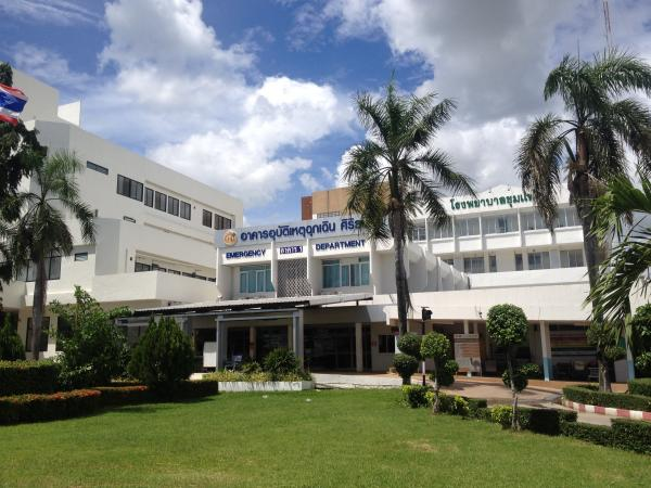 ภาพถ่ายโรงพยาบาลชุมแพ